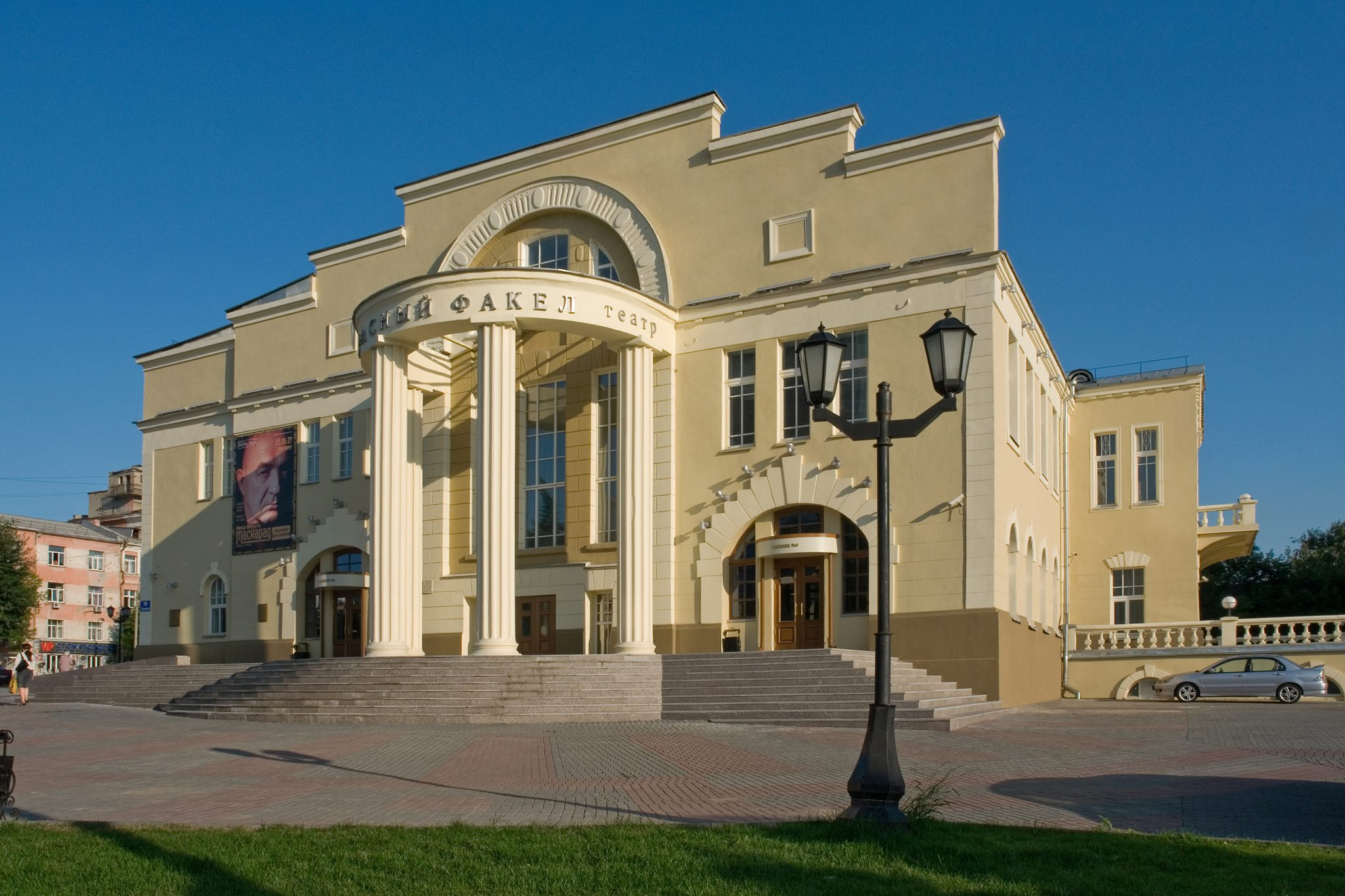 Новосибирский академический театр "Красный факел" после реконструкции.